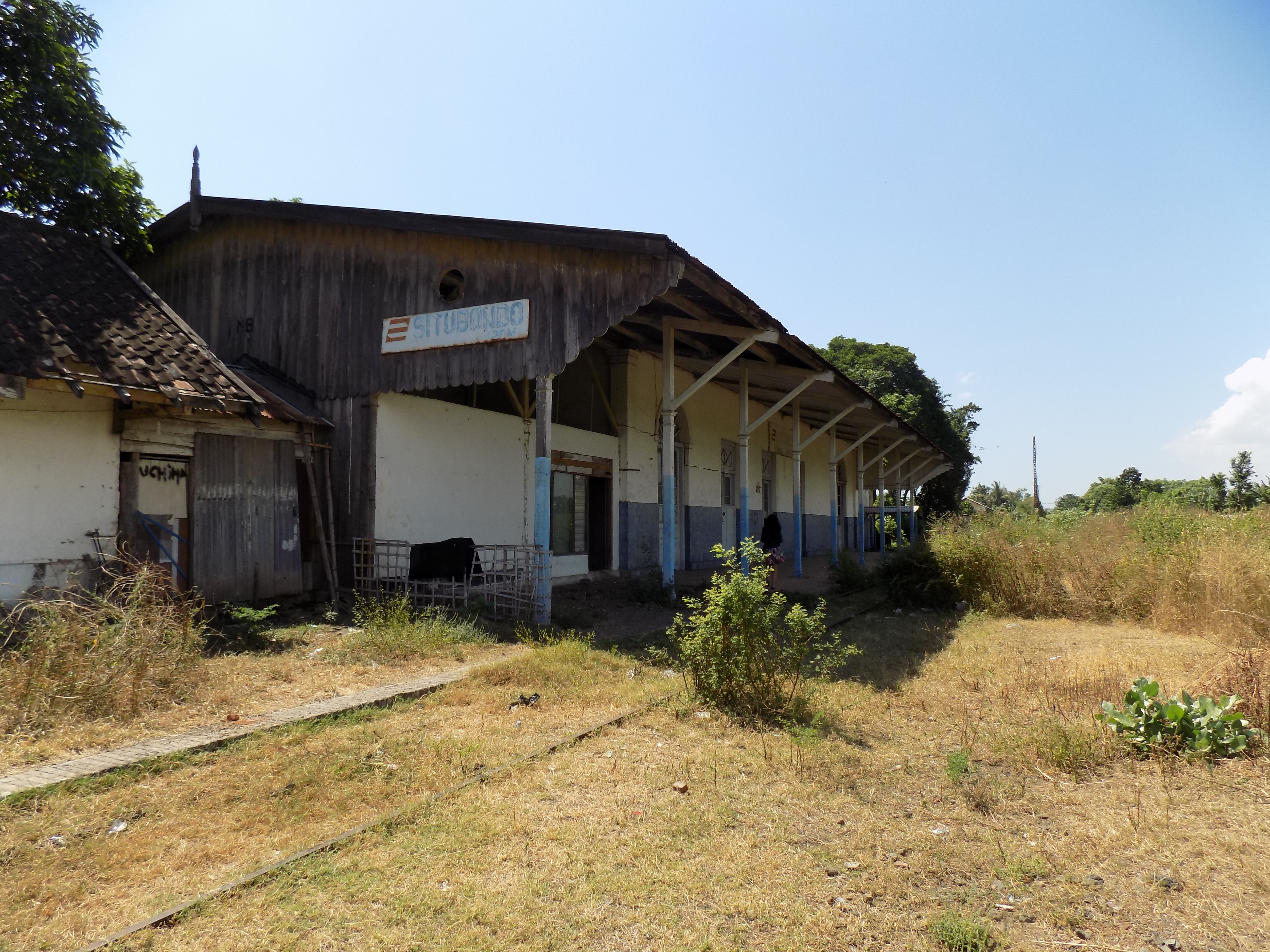 Stasiun Situbondo